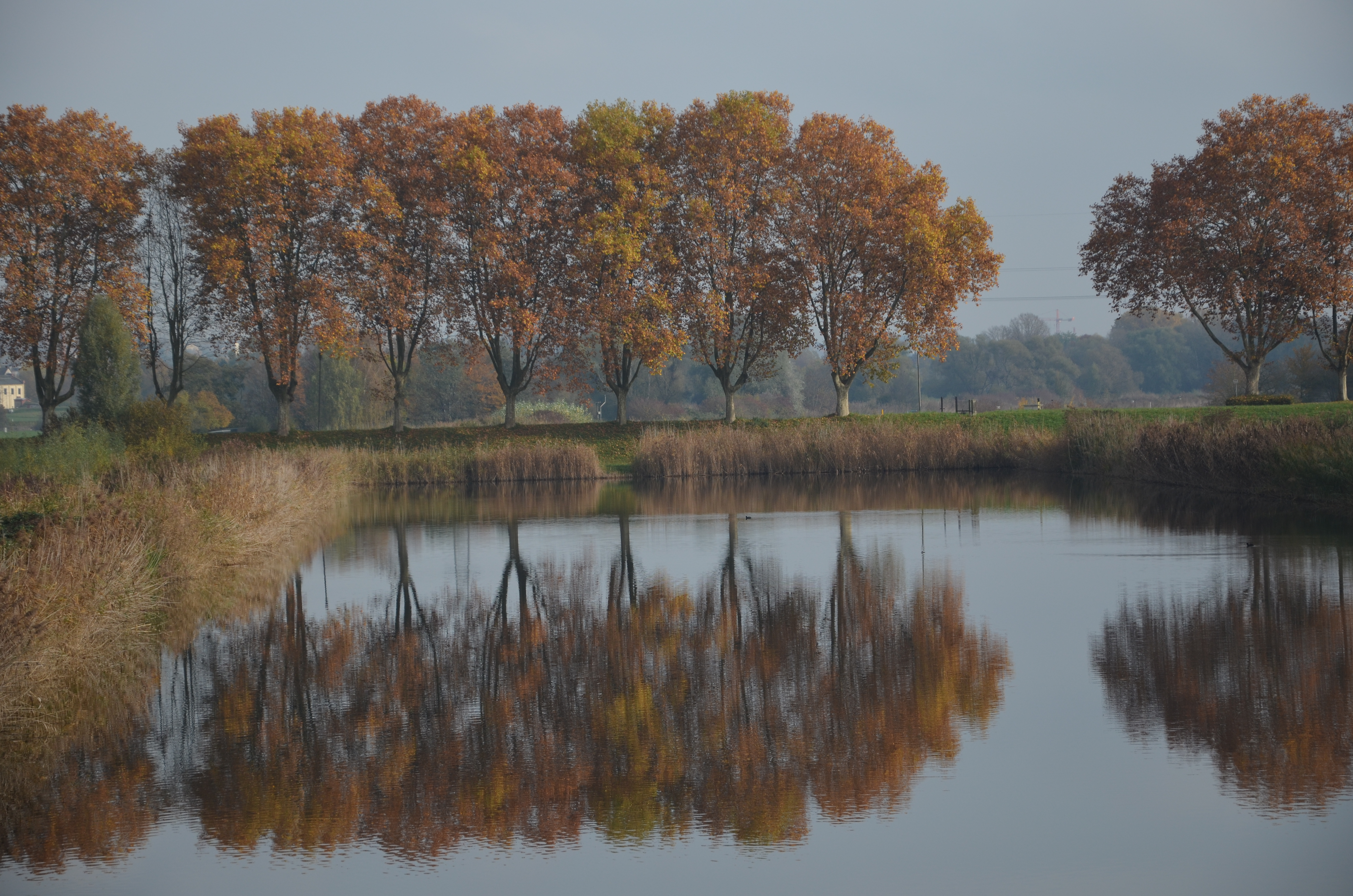 Spätherbst im „Storchengelände“, dem Feuchtgebiet am Rhein zwischen Schierstein und Walluf